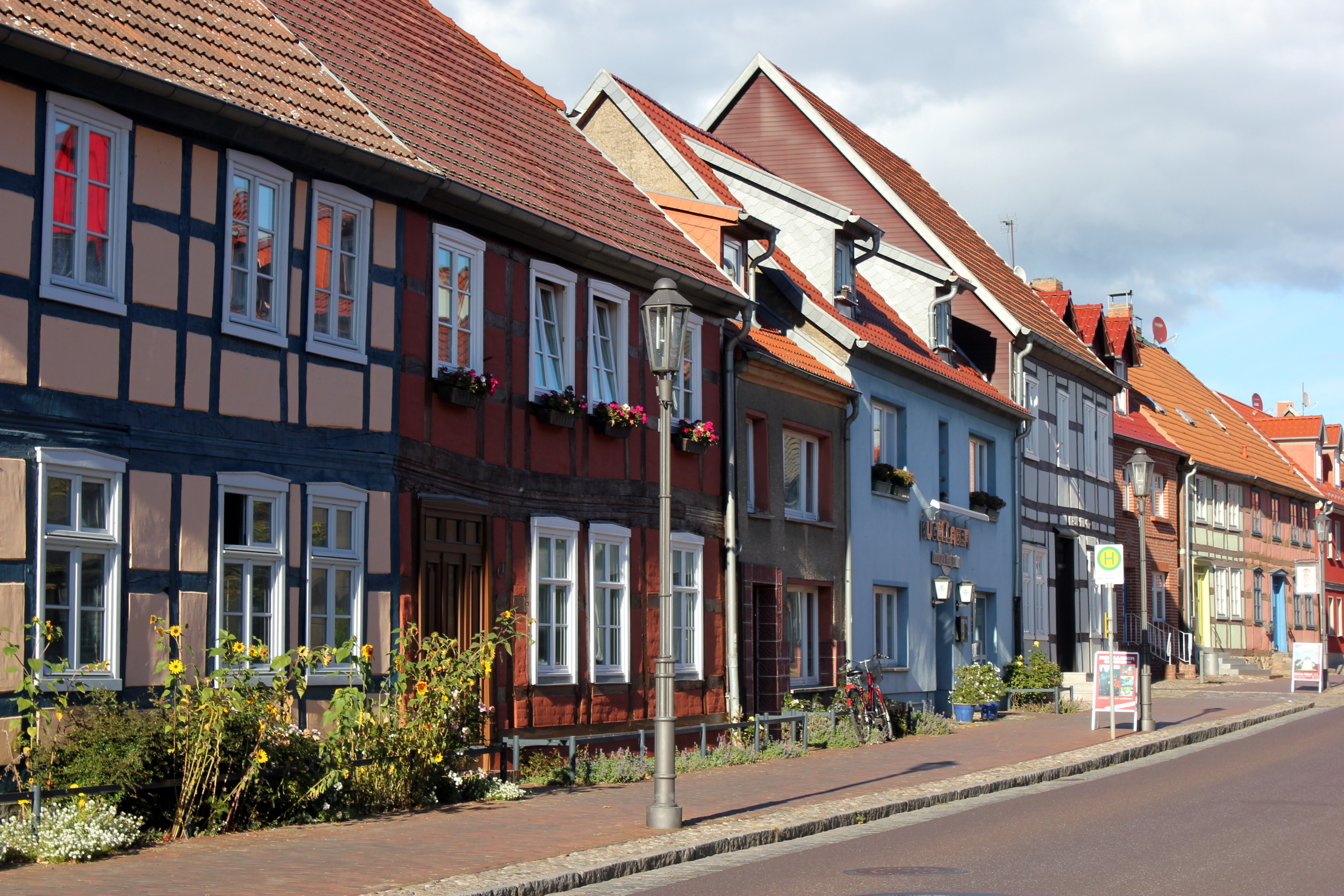 Hornjoserbsce: Chěžki noweho města w Röbelu při Moricy, Mecklenburgsko-Předpomorska.